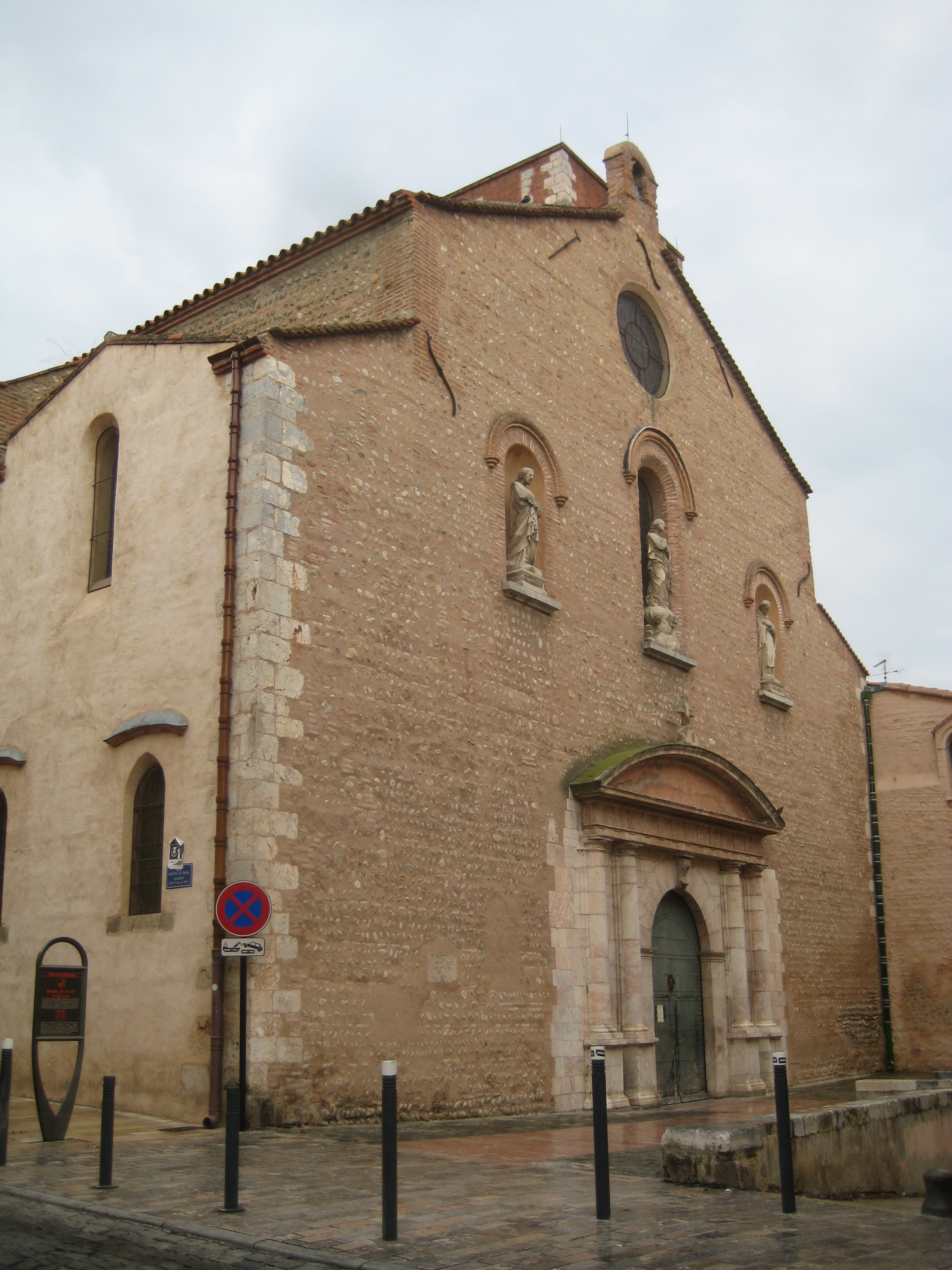 Église de la Réal .